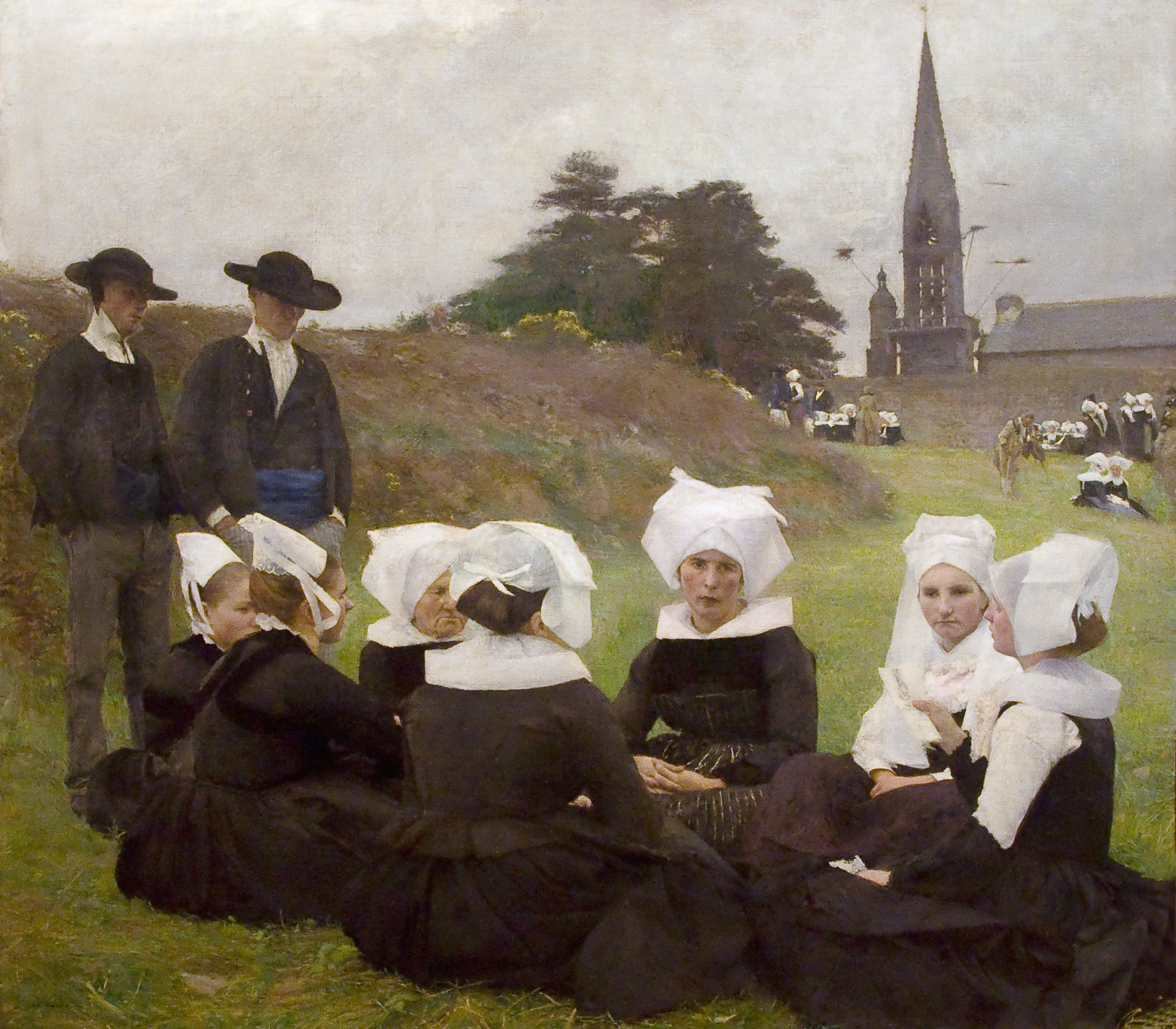 Les Bretonnes au pardon (il s'agit du pardon de Rumengol)